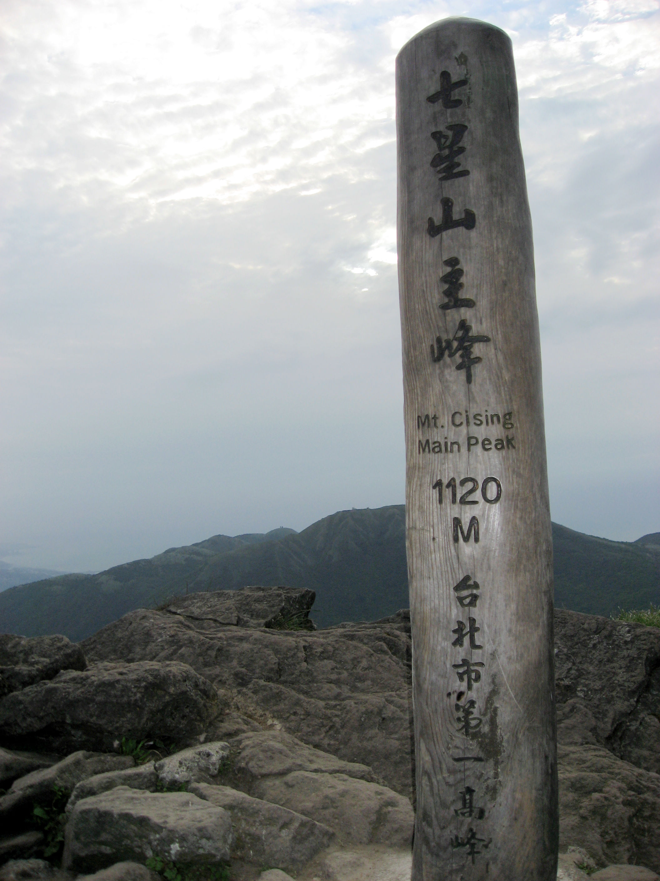 台北市七星山標高碑。